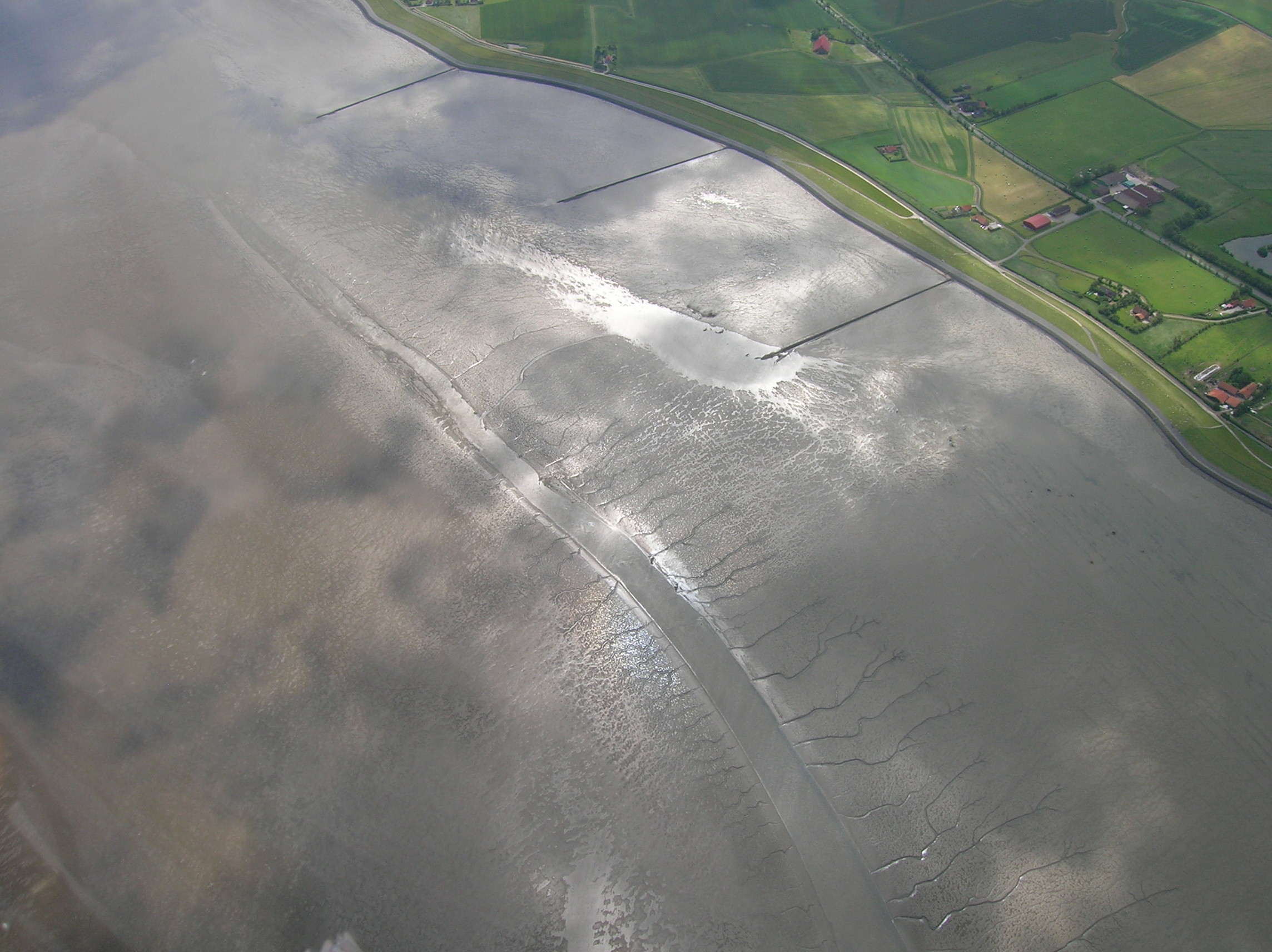 Watt bei Ostbense bei Ebbe. Gegenanflug Flugplatz Langeoog Piste 23.